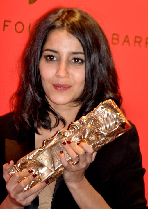 Leïla Bekhti à la cérémonie des César du cinéma, avec son César du meilleur espoir remporté pour son rôle dans le film Tout ce qui brille.